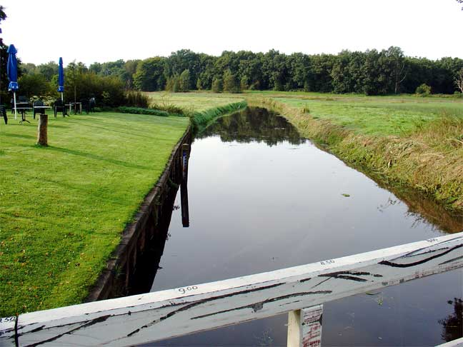 De Drentse Aa in de buurt van het gelijknamige café Licensing Categorie:Afbeelding Drenthe Categorie:Aa en Hunze